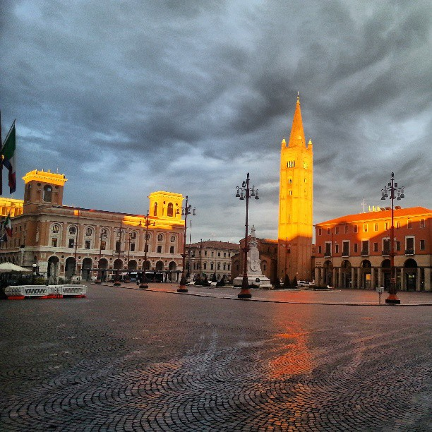 Forlì, Piazza Saffi al tramonto